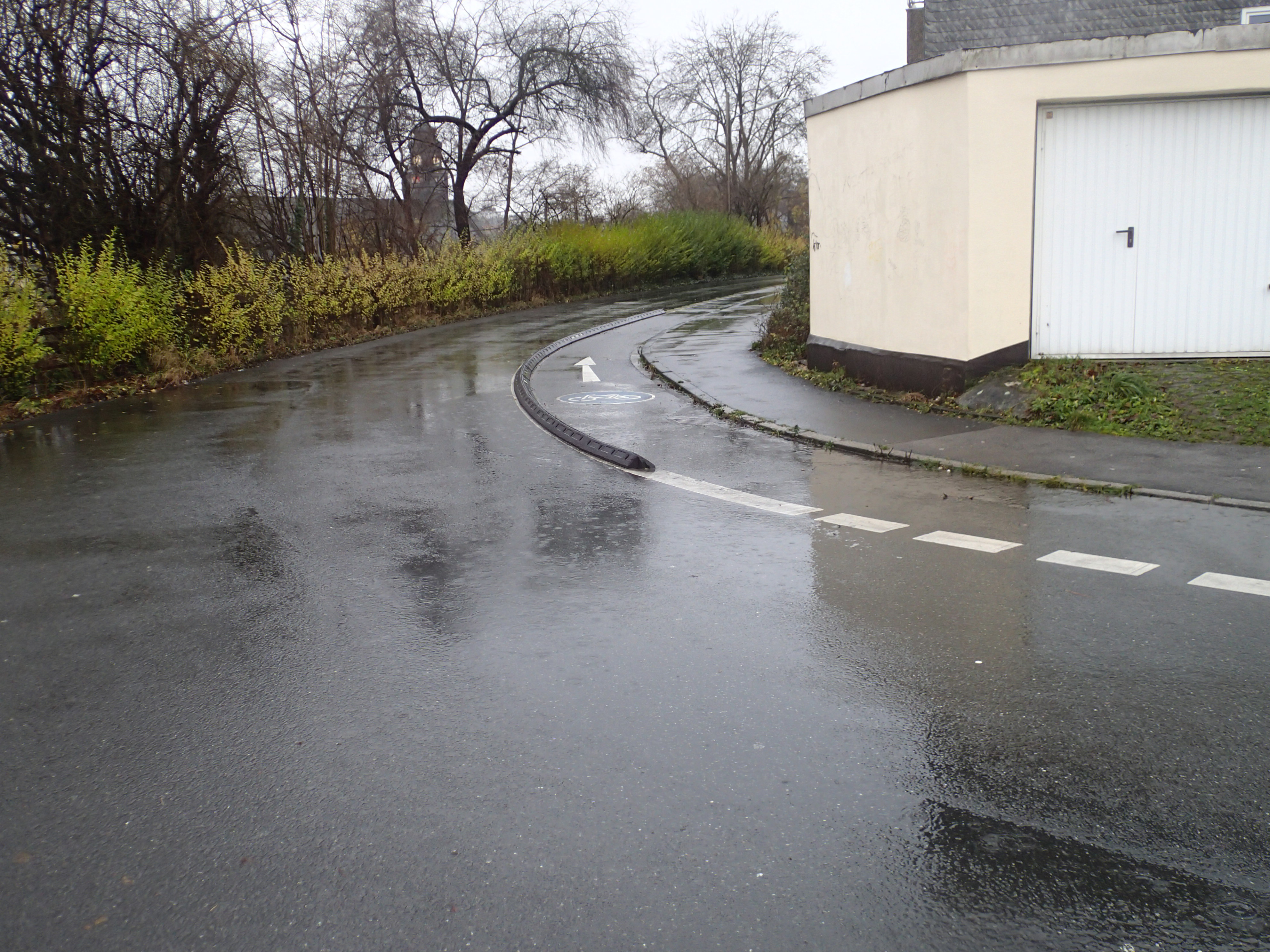 Leitschwelle in der Nathrater Straße in Wuppertal.